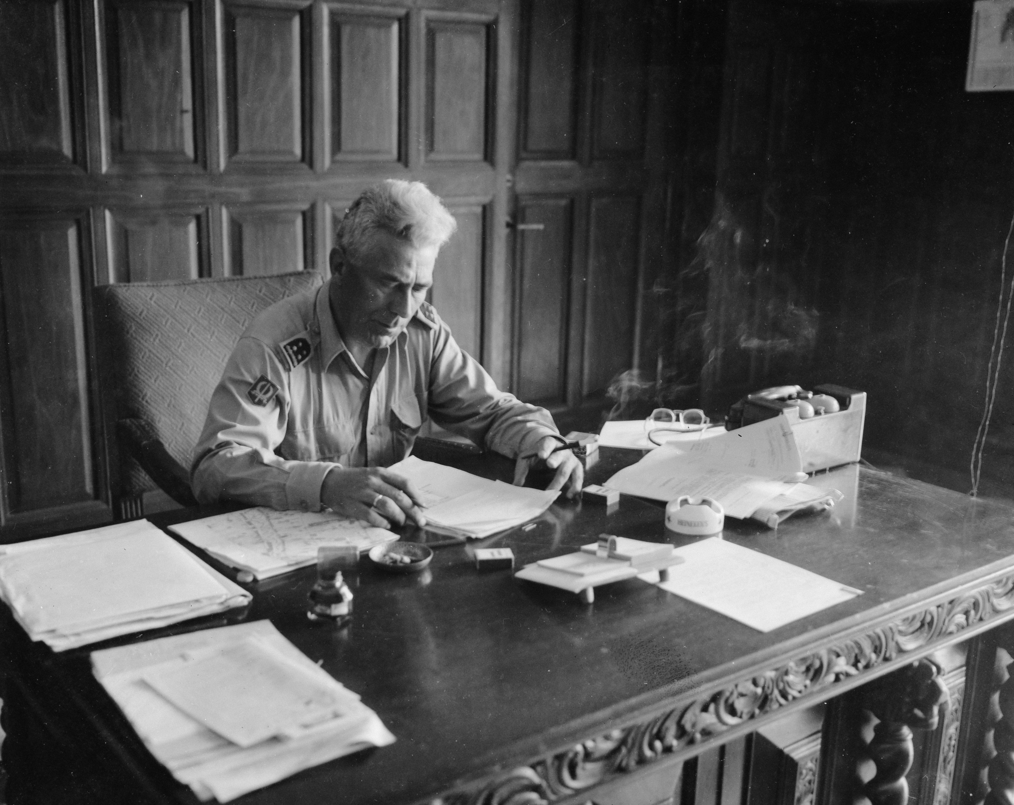 Collectie / Archief : Fotocollectie Dienst voor Legercontacten Indonesië Reportage / Serie : [ onbekend ] Beschrijving : Generaal-majoor der Infanterie KNIL Simon de Waal aan het werk achter zijn bureau Datum : september 1947 Locatie : Indonesië, Nederlands-Indië Fotograaf : Fotograaf Onbekend / DLC Auteursrechthebbende : Nationaal Archief Materiaalsoort : Negatief (zwart/wit) Nummer archiefinventaris : bekijk toegang 2.24.04.03 Bestanddeelnummer : 12134